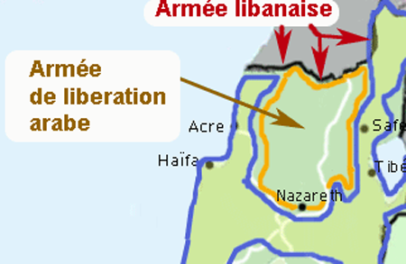 Détaildu déploiement des forces dans la région de la galilée, fin mai début juin 1948.